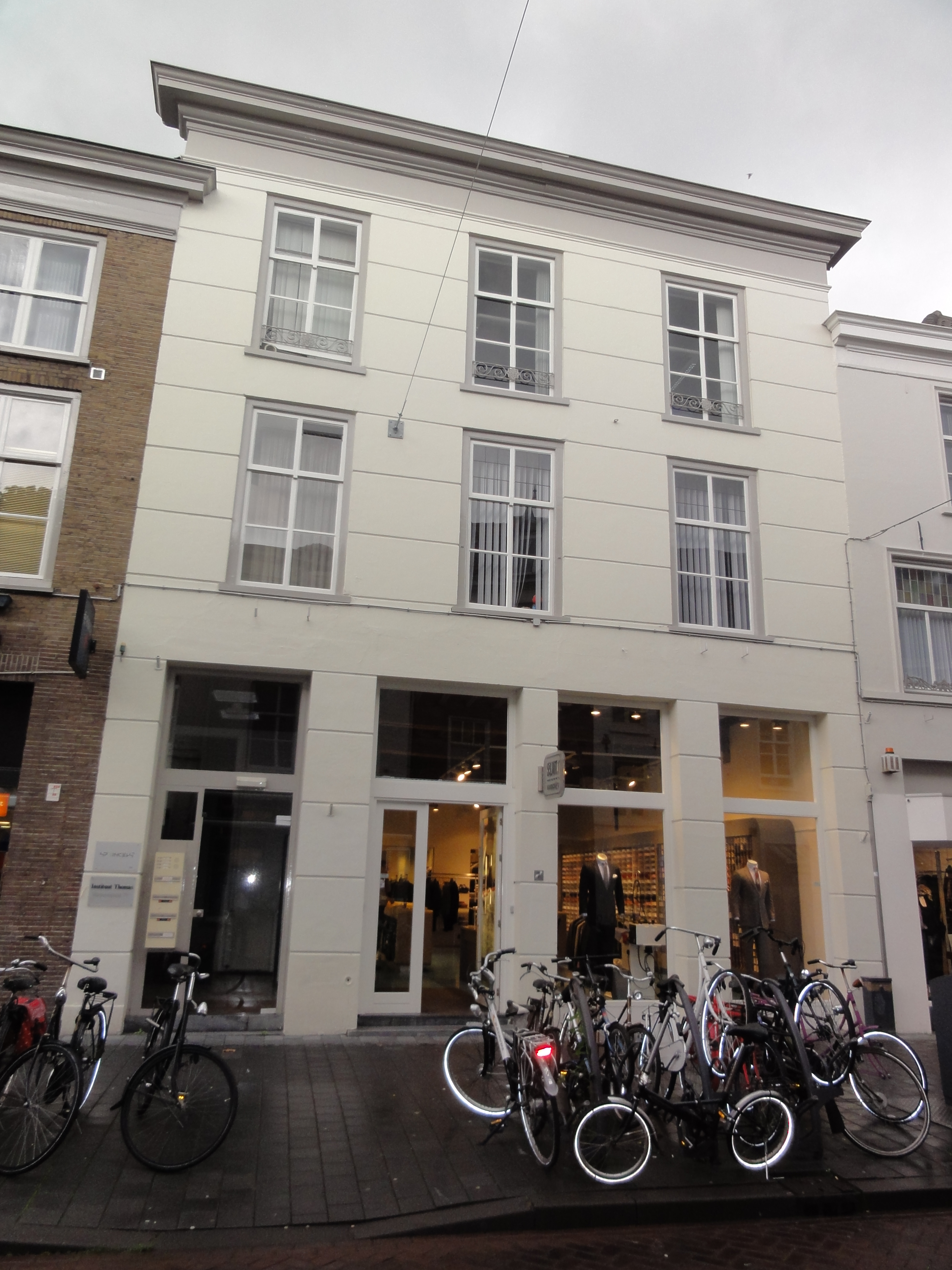 's-Hertogenbosch Rijksmonument 21885 Verwersstraat 7, 7D 08″ N, 5° 18′ 15.2″ E Object location51° 41′ 15.6″ N, 5° 18′ 14.84″ E